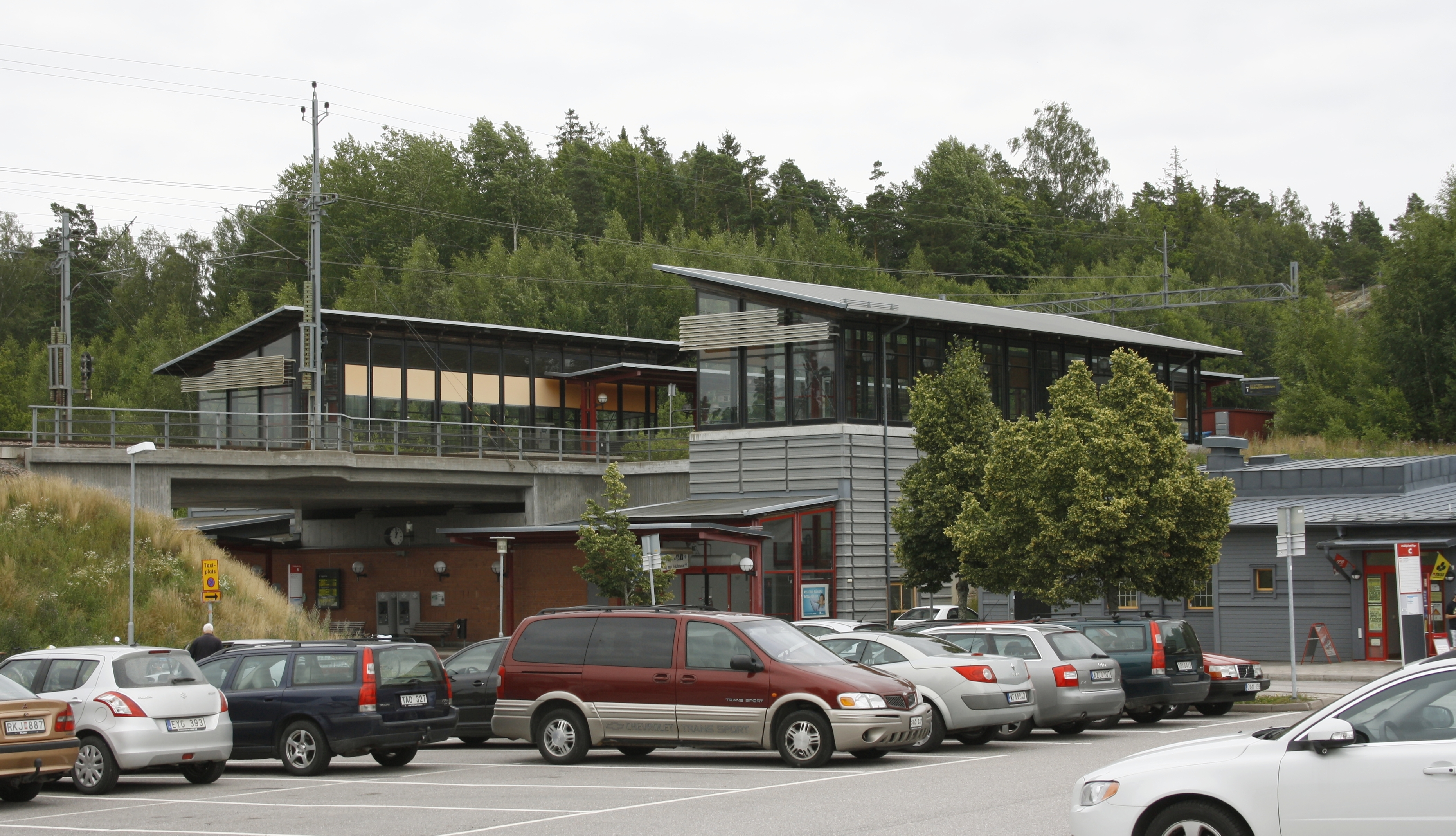 Läggesta station, Mariefred, Södermanland, Sverige, juli 2012